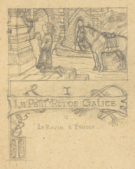 Debuxo de Eugène Grasset para o poema «Le Petit Roi de Galice» (O reiciño de Galiza) incluído na primeira serie da obra La Légende des siècles (A lenda dos séculos) de Victor Hugo (1859).